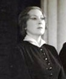 Makay Margit (1891–1989) magyar színésznő, Kiváló művész.